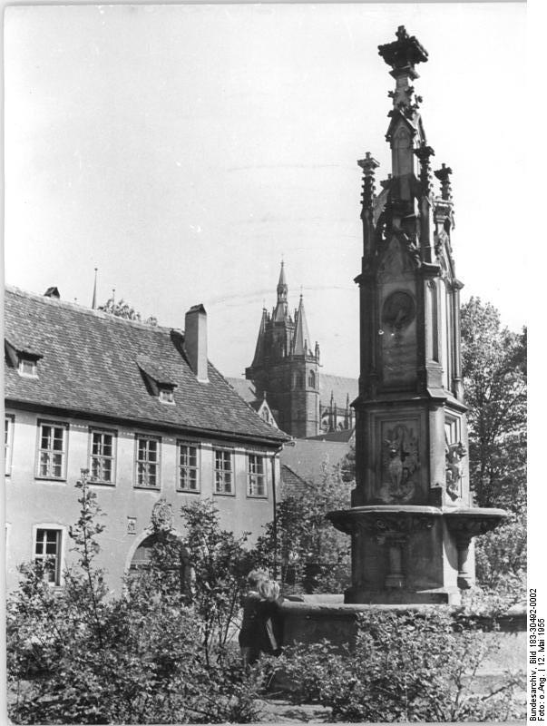 Erfurt, Hermannsplatz, Hermannsdenkmal Zentralbild TBD 12.5.1955 -2975- Erfurt, die Stadt des V. Parlaments der Freien Deutschen Jugend. UBz: Hermannsplatz mit Hermannsdenkmal und Blick auf den Dom. Information added by Wikimedia users. Herrmannsplatz mit Herrmannsdenkmal und Blick auf den Dom